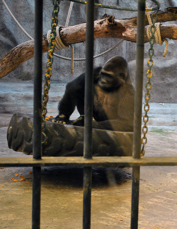 Bua Noi